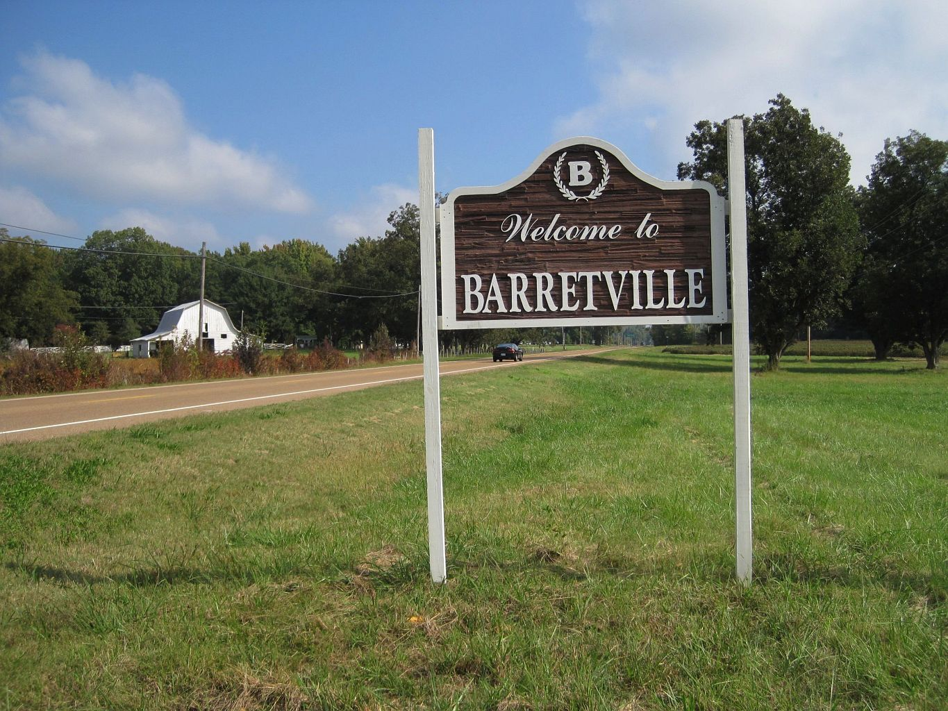 Barretville, Tennessee